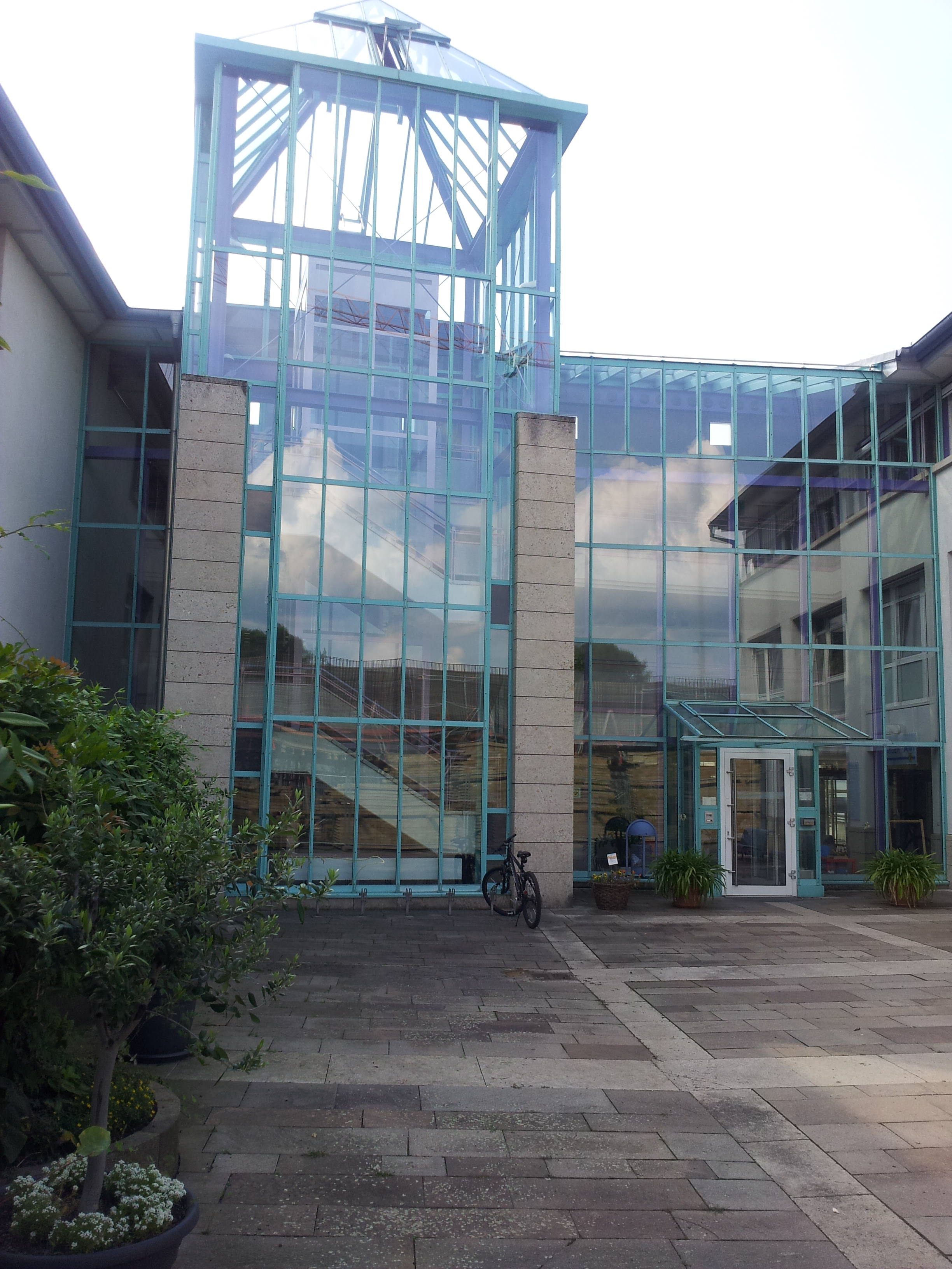 Das Rathaus in Kernen-Rommelshausen.